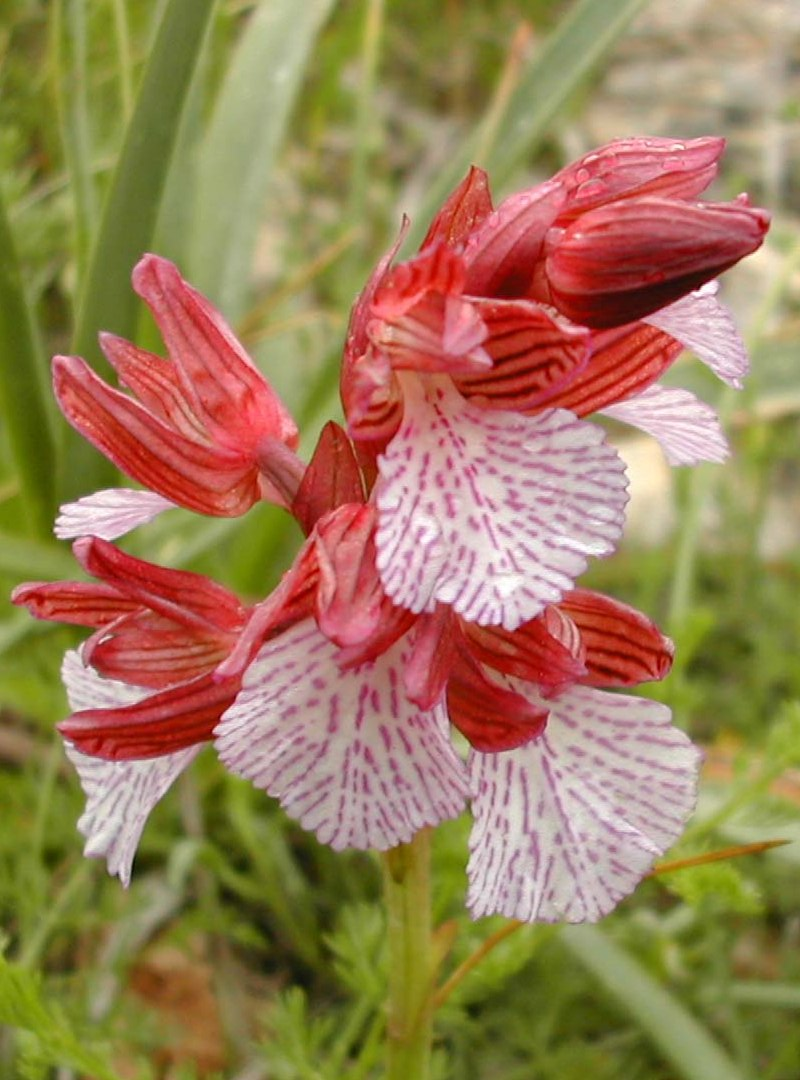 Orchidée Valdemiana (Orchis papilionacea)